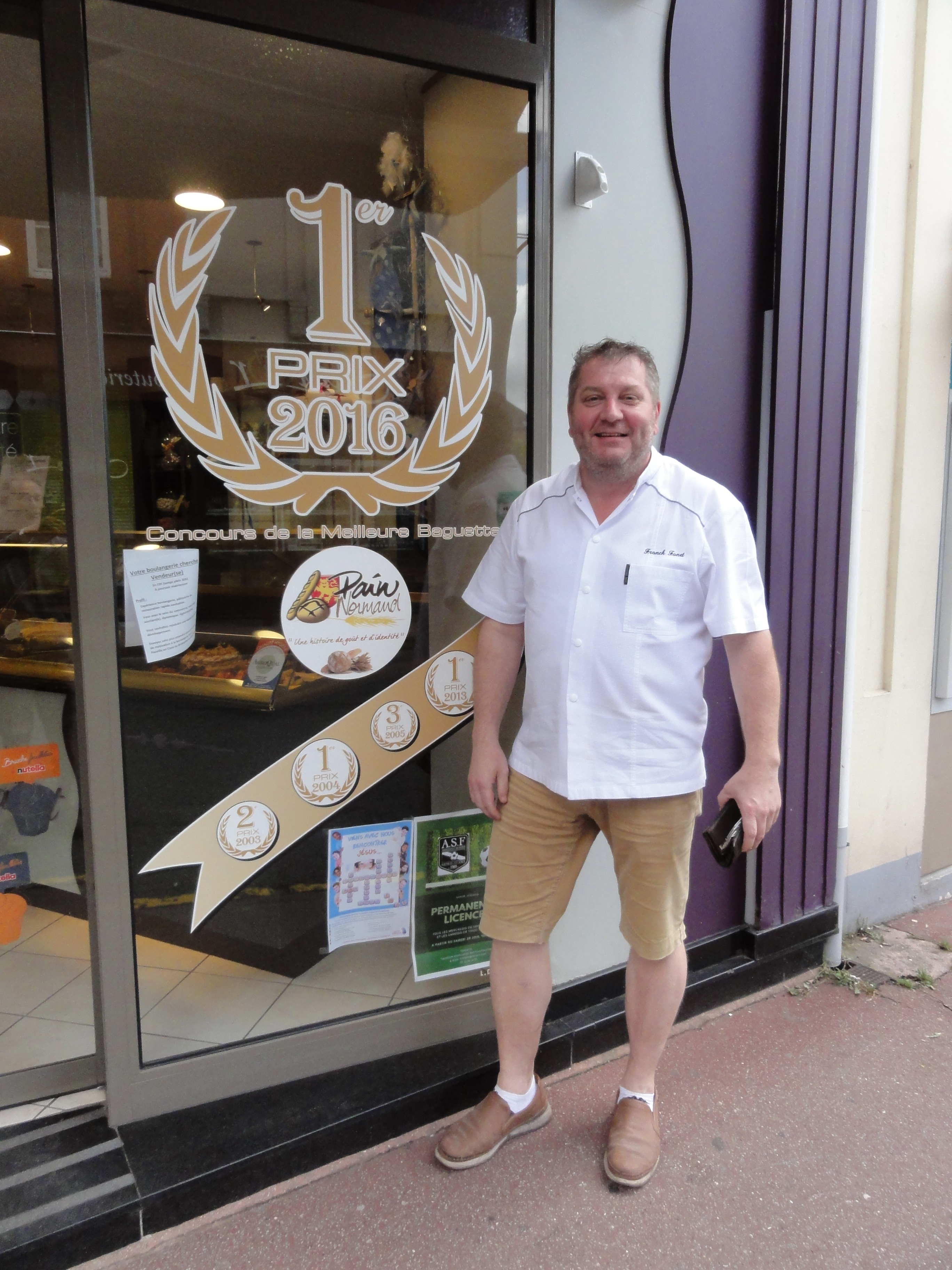 Fauville-en-Caux (Seine-Maritime) Prix concours de la meilleure baguette